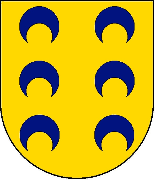 Brasão da Família Amaral